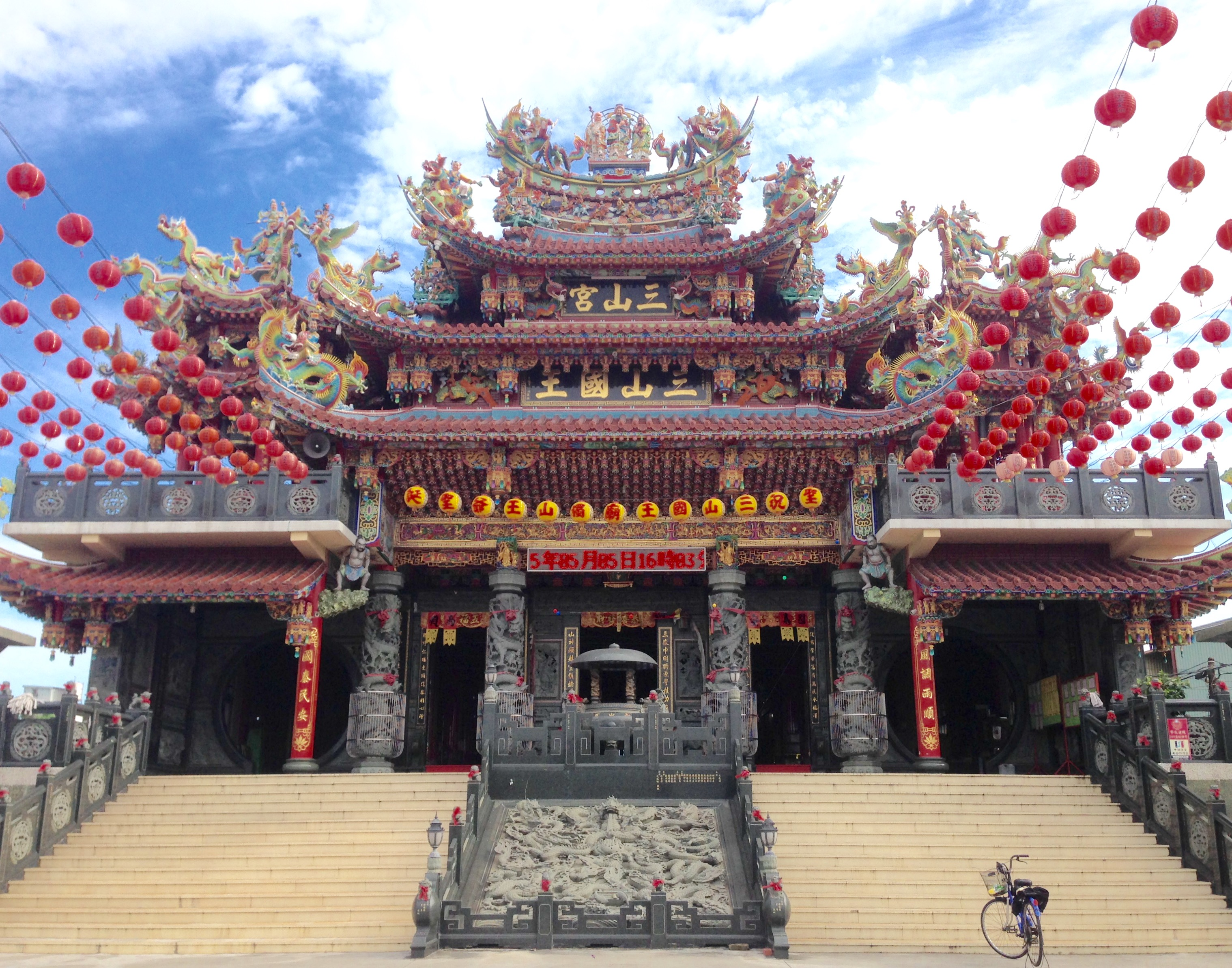 三德里三山宮